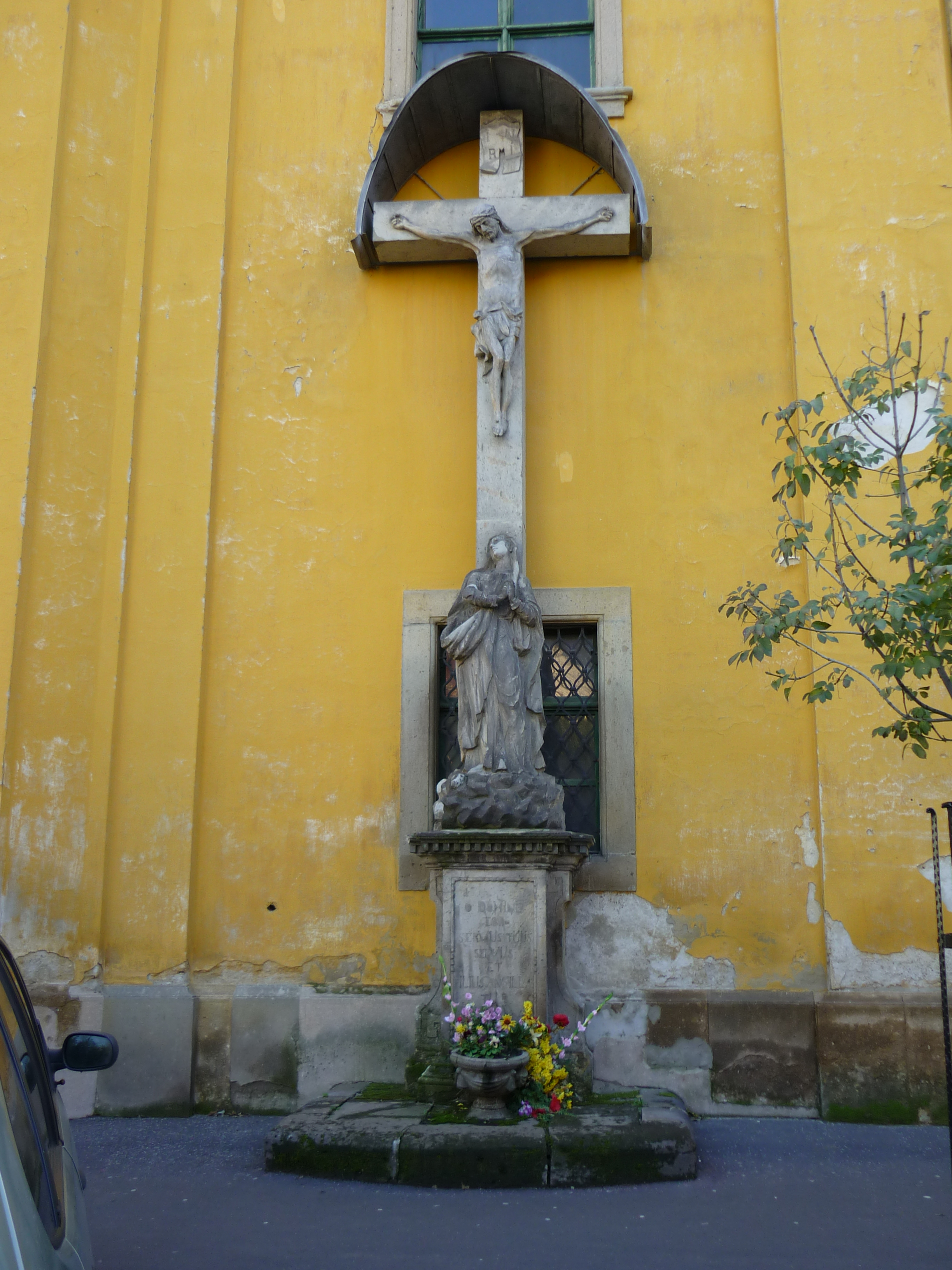 Mater Dolorosa-szobor Egerben, a ferences templom előtt (Giovanni Adami munkája)